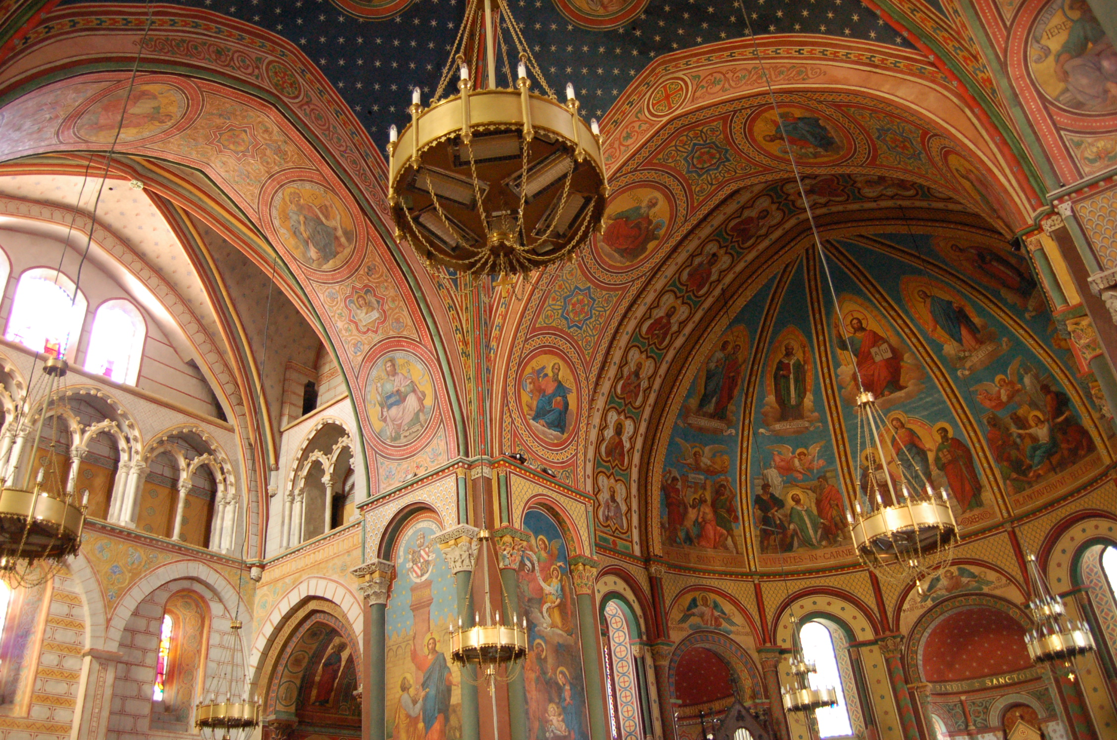 Intérieur de la Cathédrale Saint-Caprais d'Agen